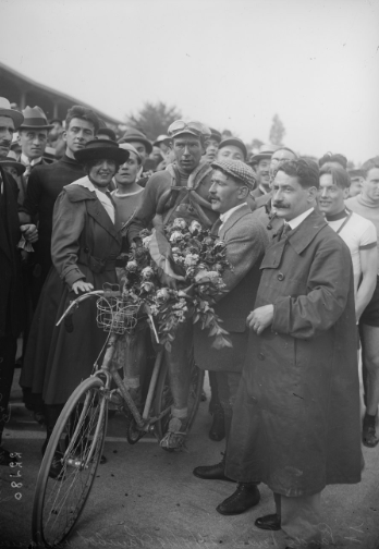 Le coureur belge Firmin Lambot reçoit un bouquet de fleurs après sa victoire au classement général du Tour de France 1919.